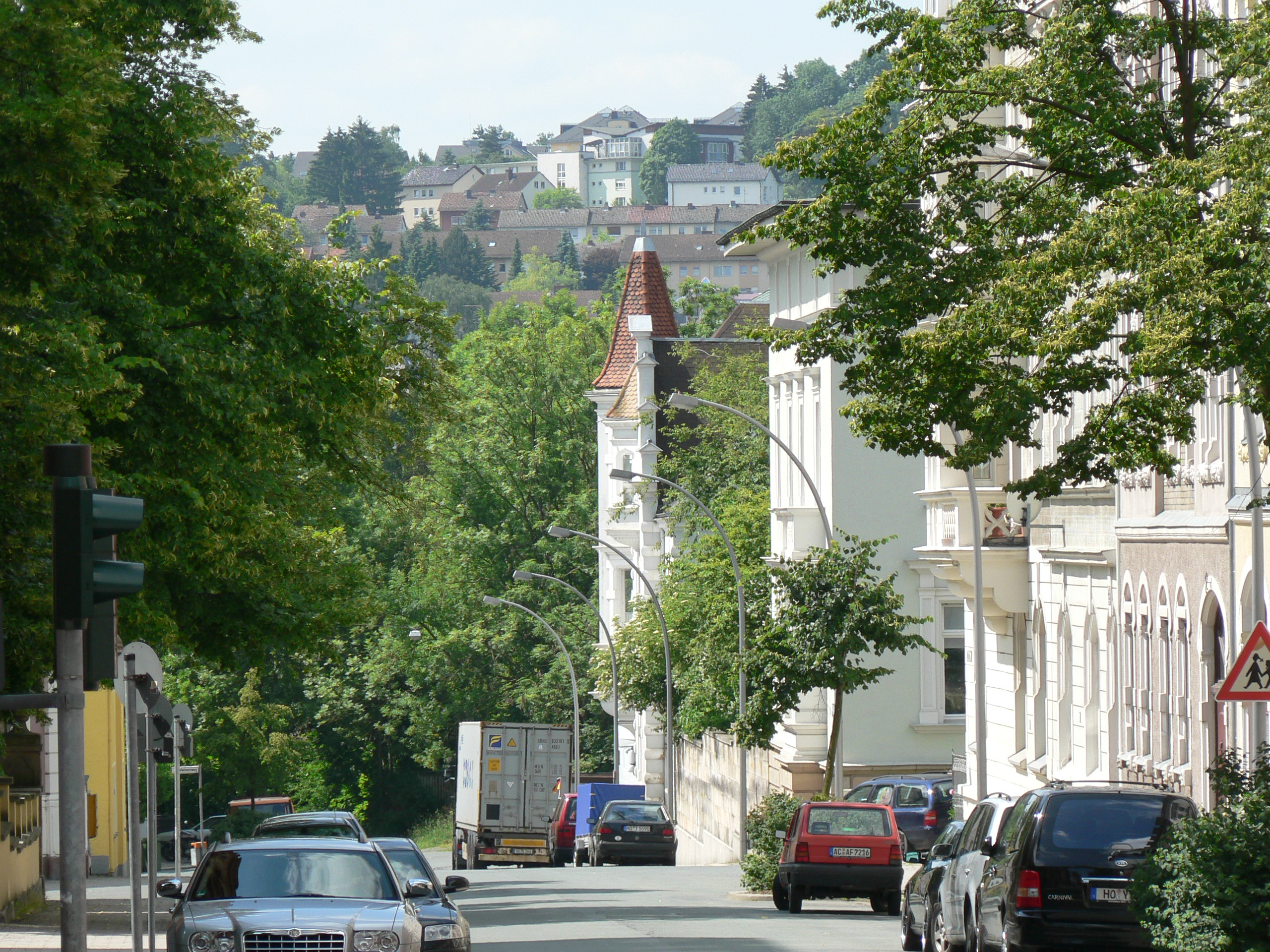 Westendviertel auf der Höhe des Schiller Gymnasiums Hof mit Blick auf das Münsterviertel